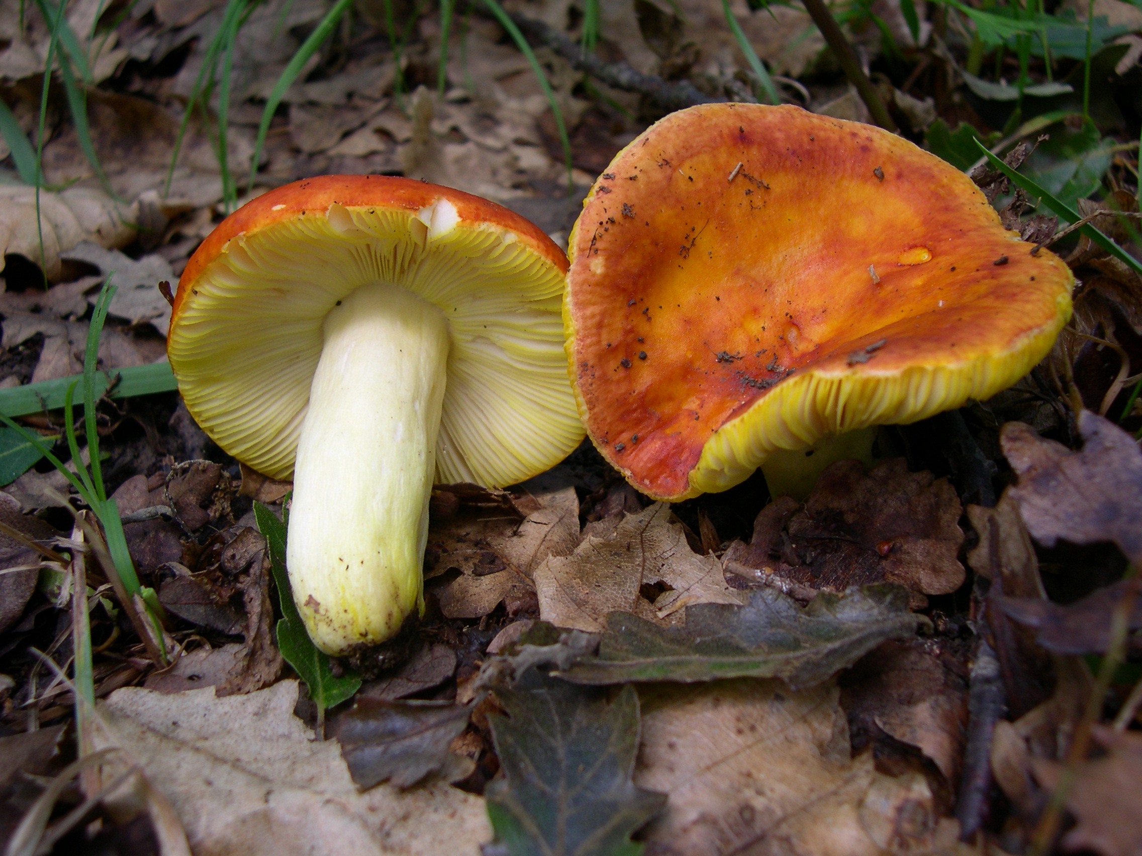 Russula aurea Pers.